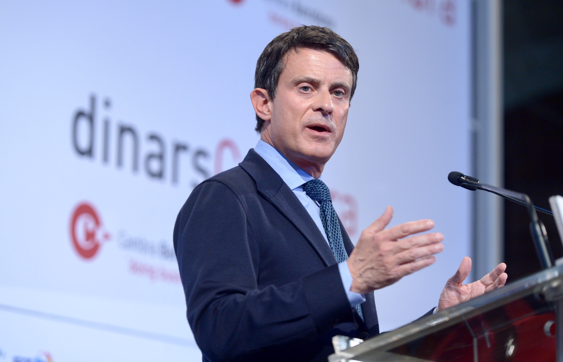 Pla detall del candidat a l'Ajuntament de Barcelona, Manuel Valls, durant la seva intervenció als Dinars Cambra on ha explicat el seu model de ciutat.